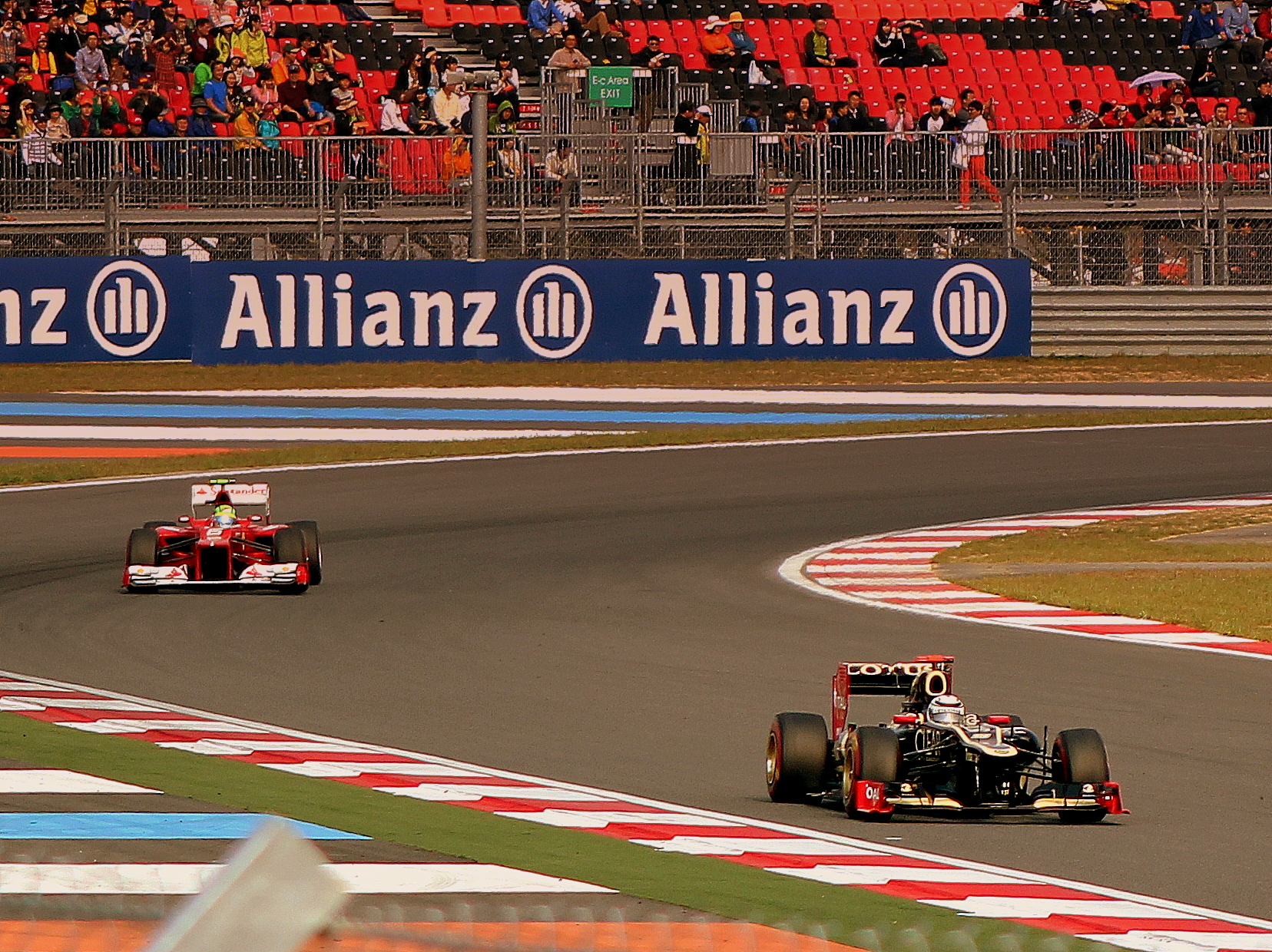 YEONGAM KOREAN GRAND PRIX OCT 2012